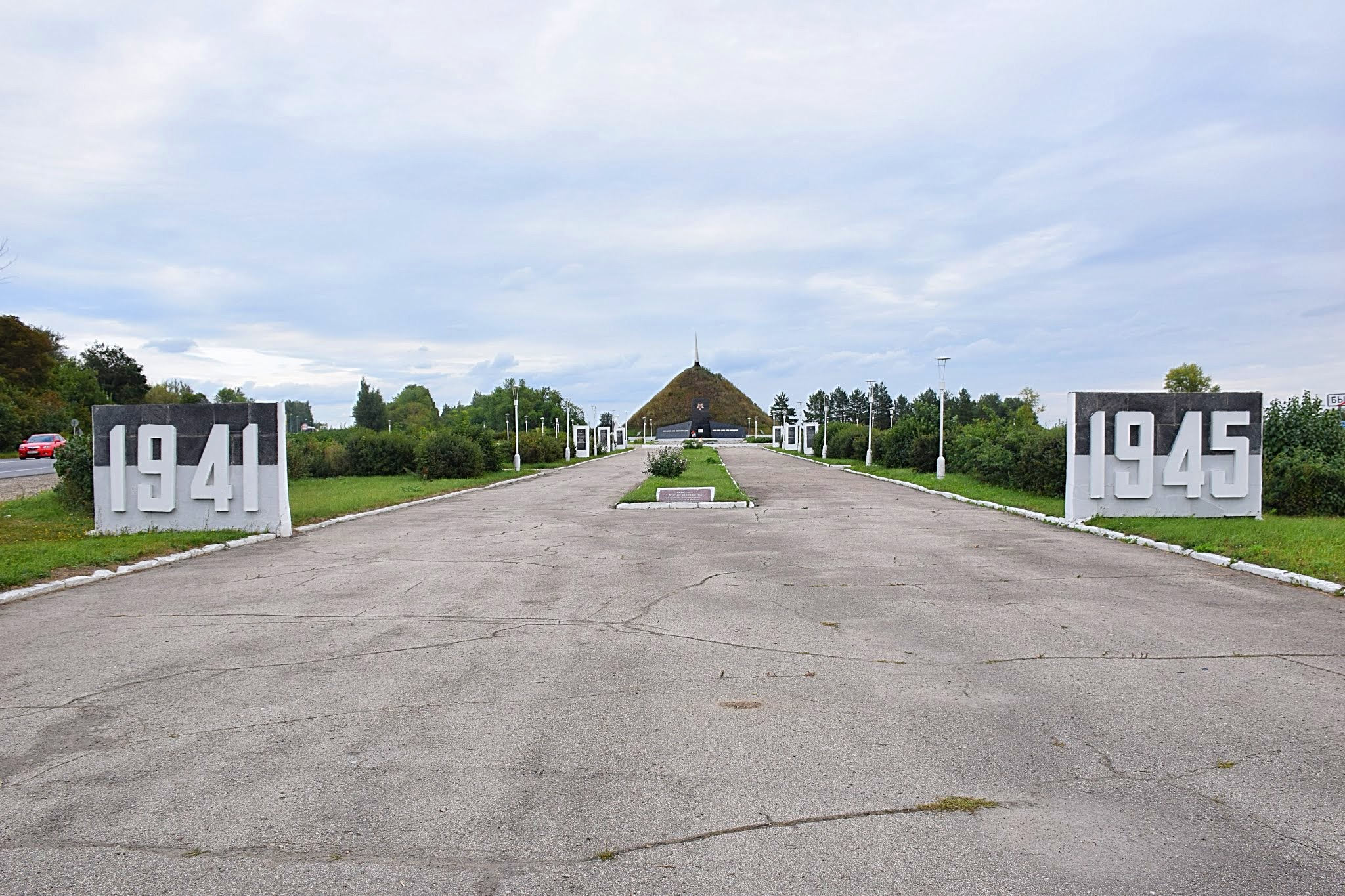 Мемориальный комплекс «Курган Бессмертия»: развилка дорог Тула—Новомосковск и Быковка—Богородицк, Быковка, Киреевский район, Тульская область